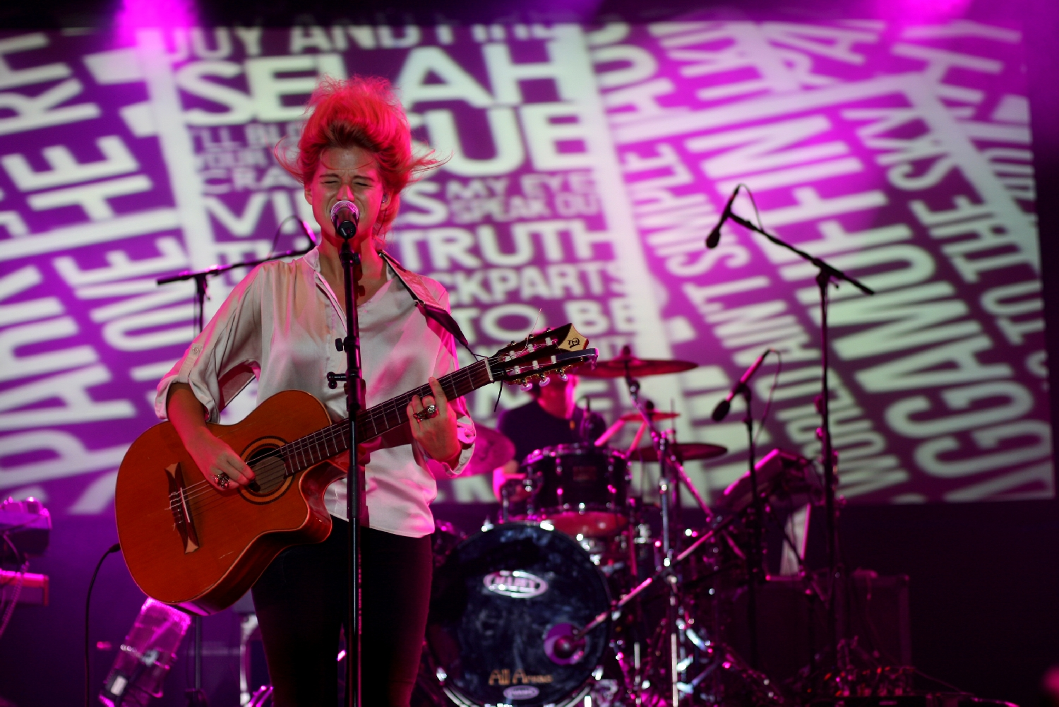 Selah Sue @Sziget2011